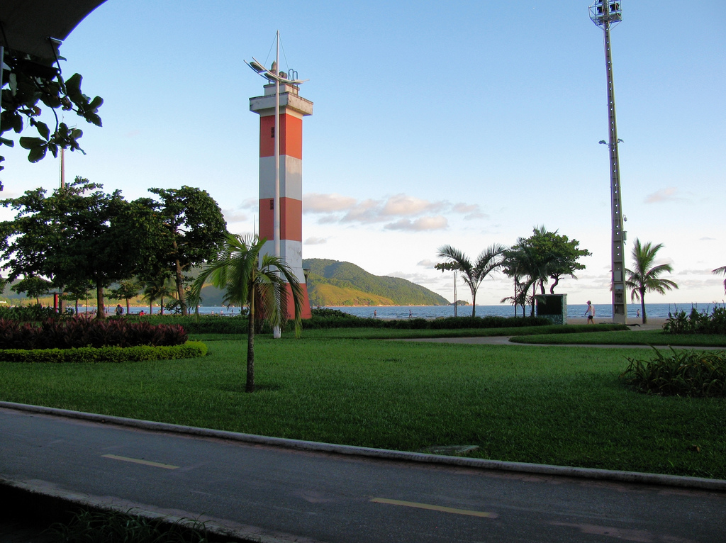 Santos - SP, Brazil